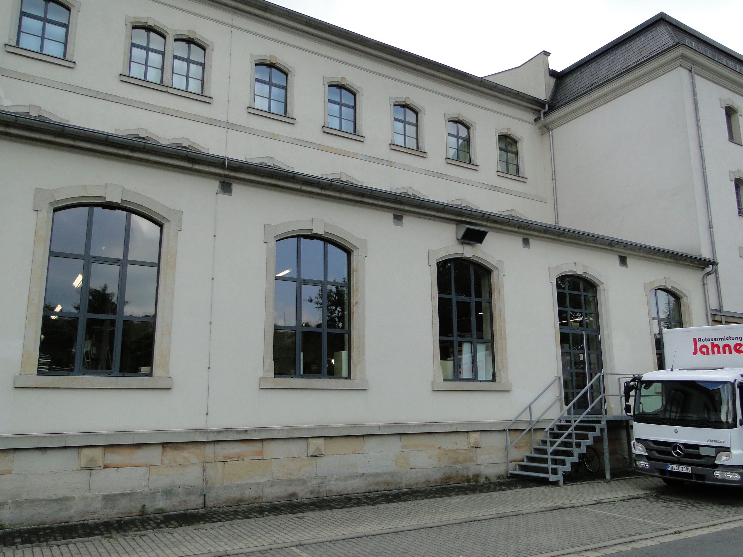 Kulturdenkmal Elisabeth-Boer-Straße 2 Dresden